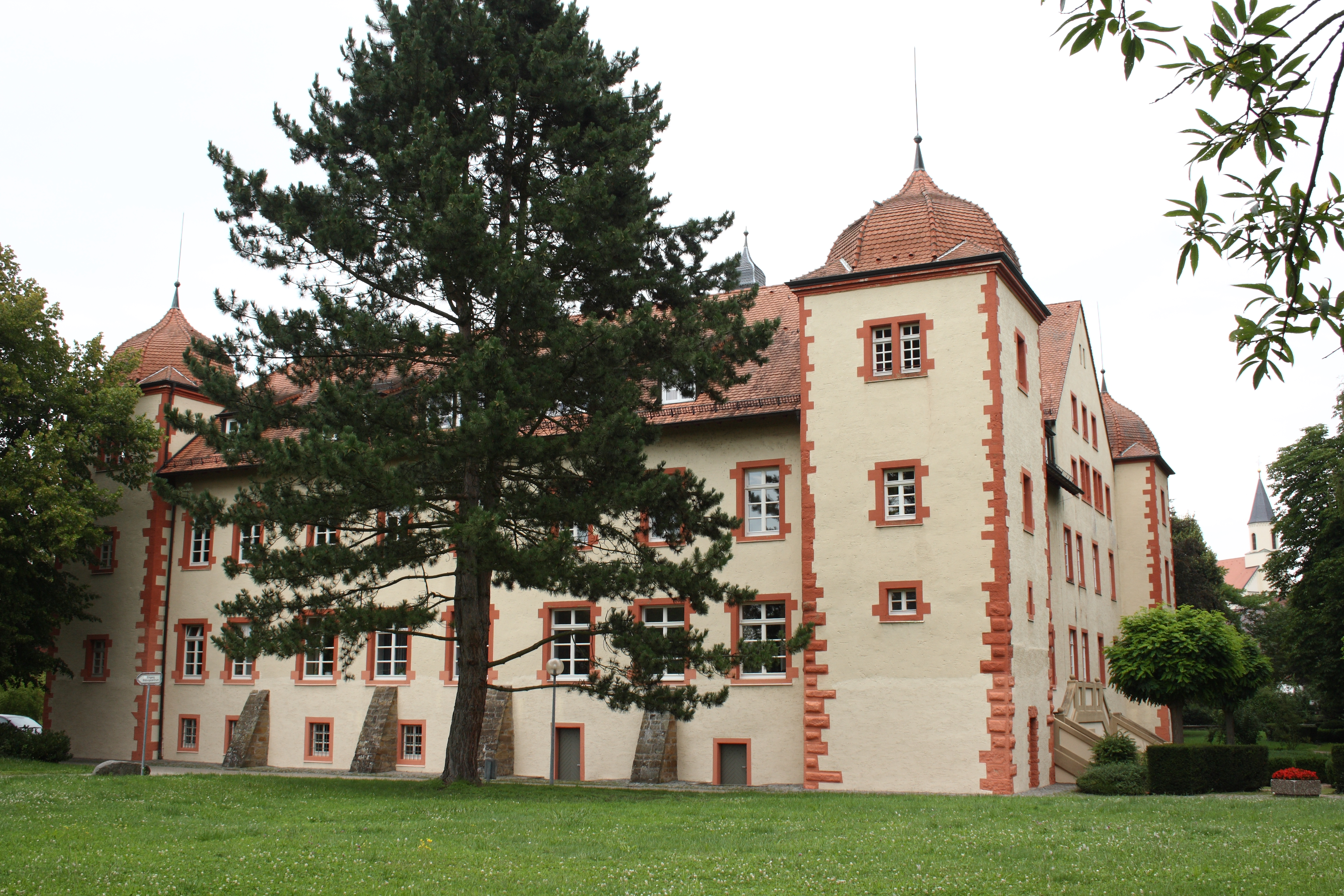 Wasserschloss in Flehingen